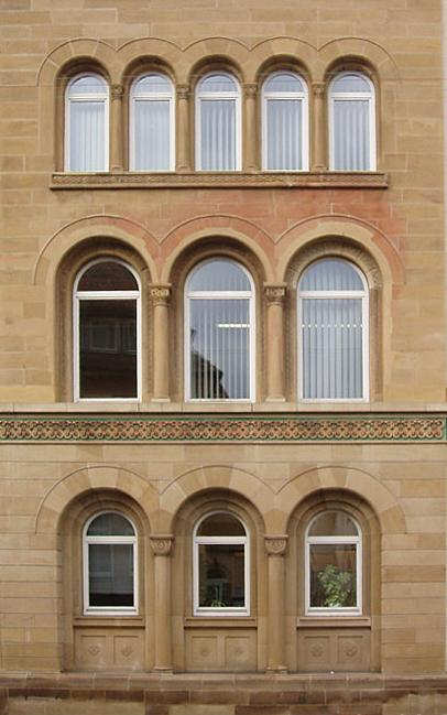 Detail Wilhelmsbau